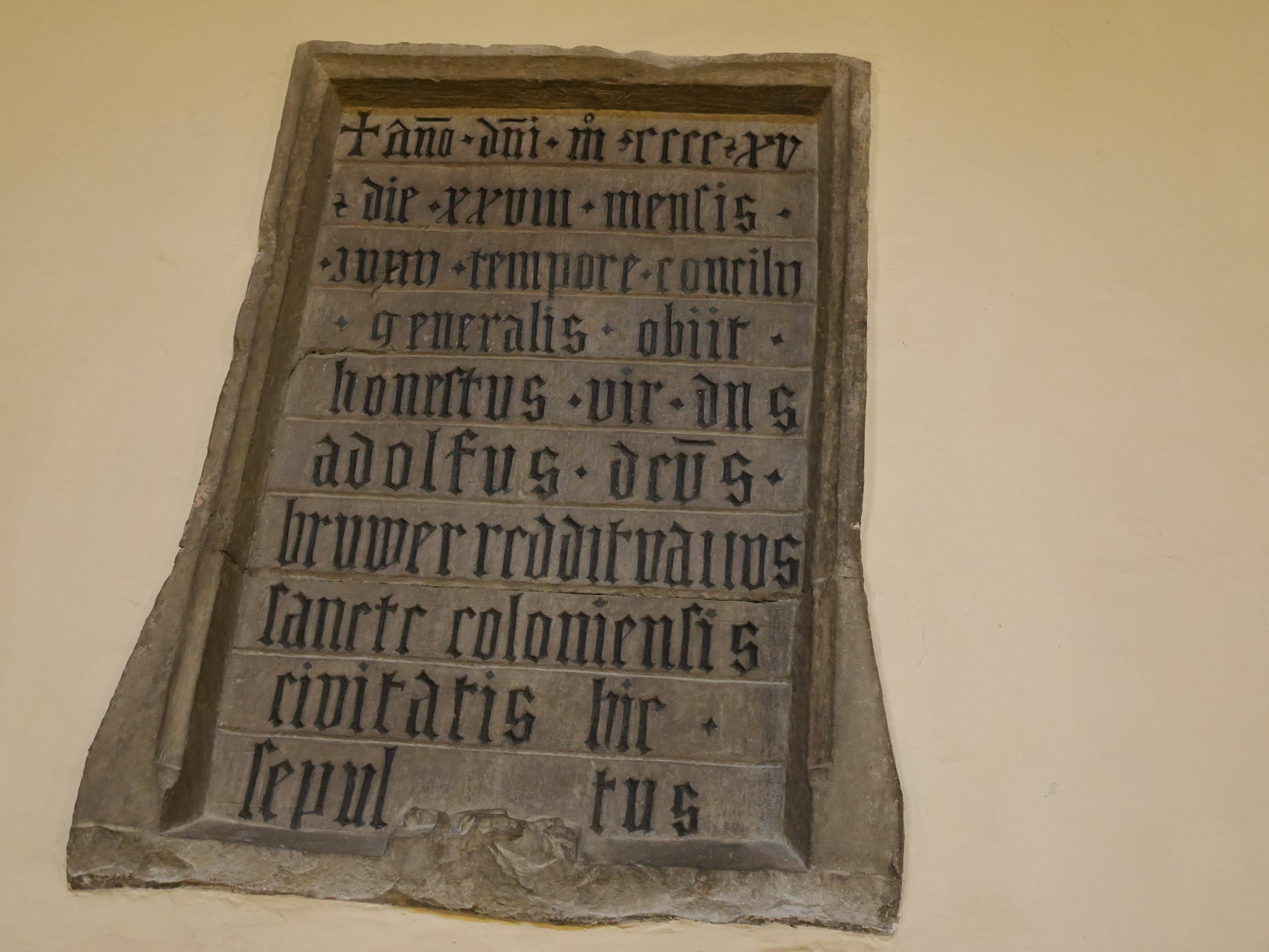 St. Stefan (Konstanz) - Interior